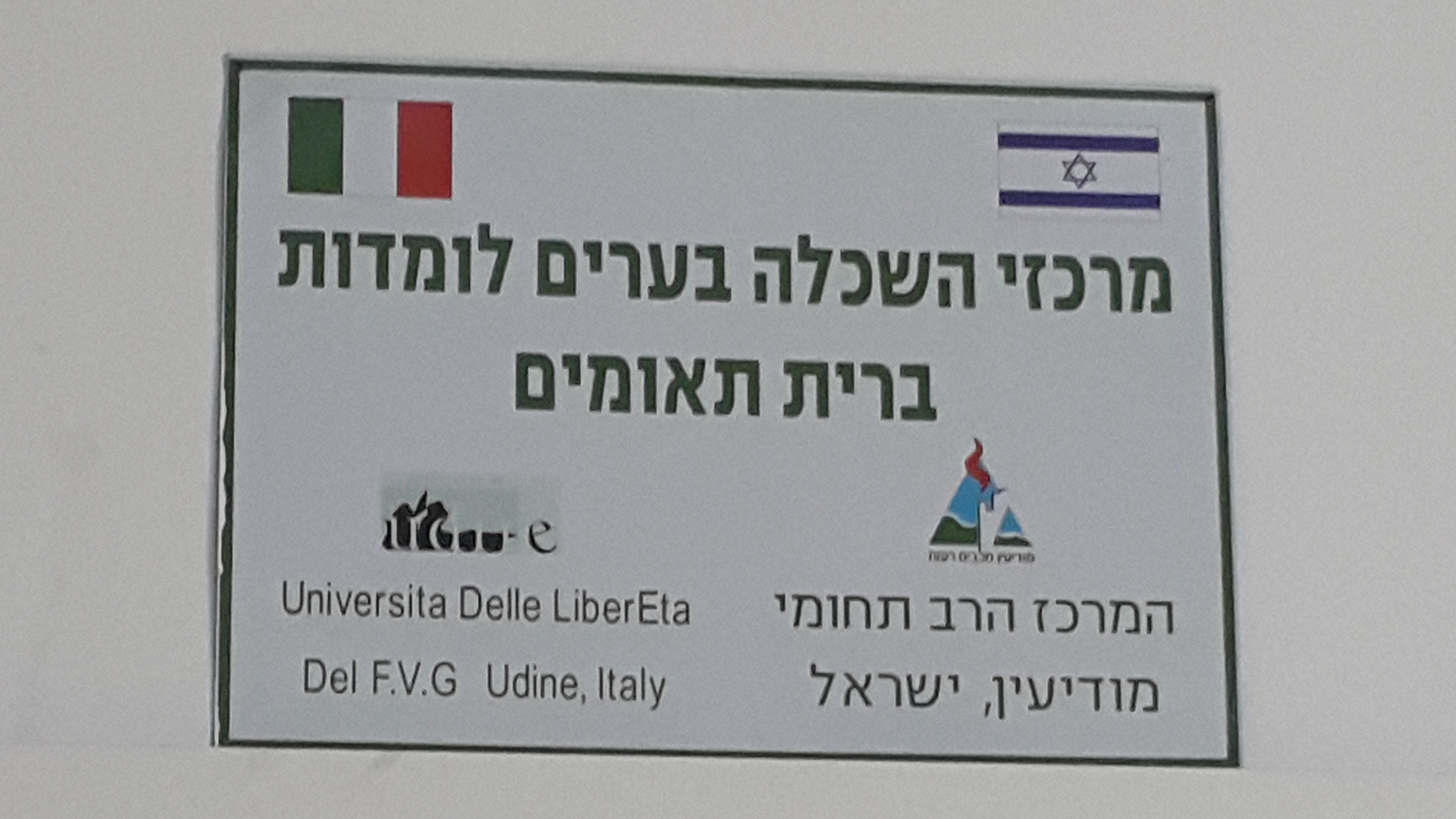 שיתוף פעולה בין ערים תאומות - מודיעין ויודיין